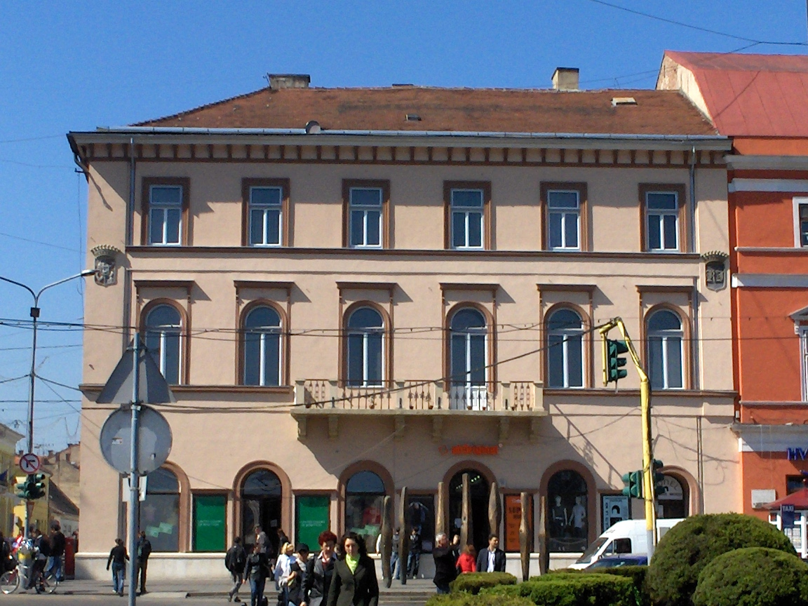 Rhedey Palace, Cluj-Napoca, Romania